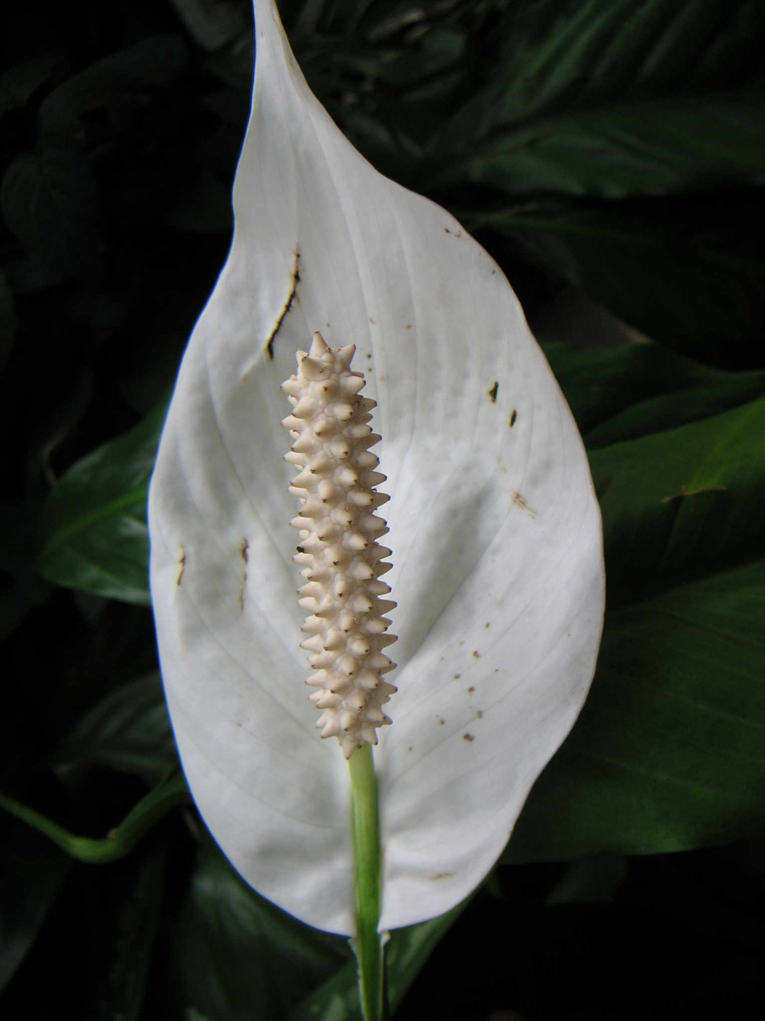 Der Fotografin unbekannte Pflanze, Cali / Kolumbien